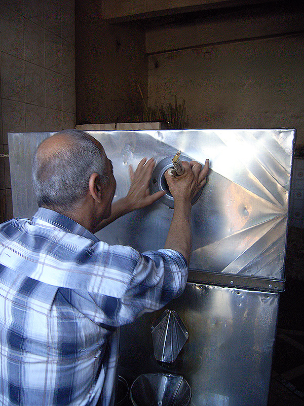 Herstellung von Zuckerrohrsaft